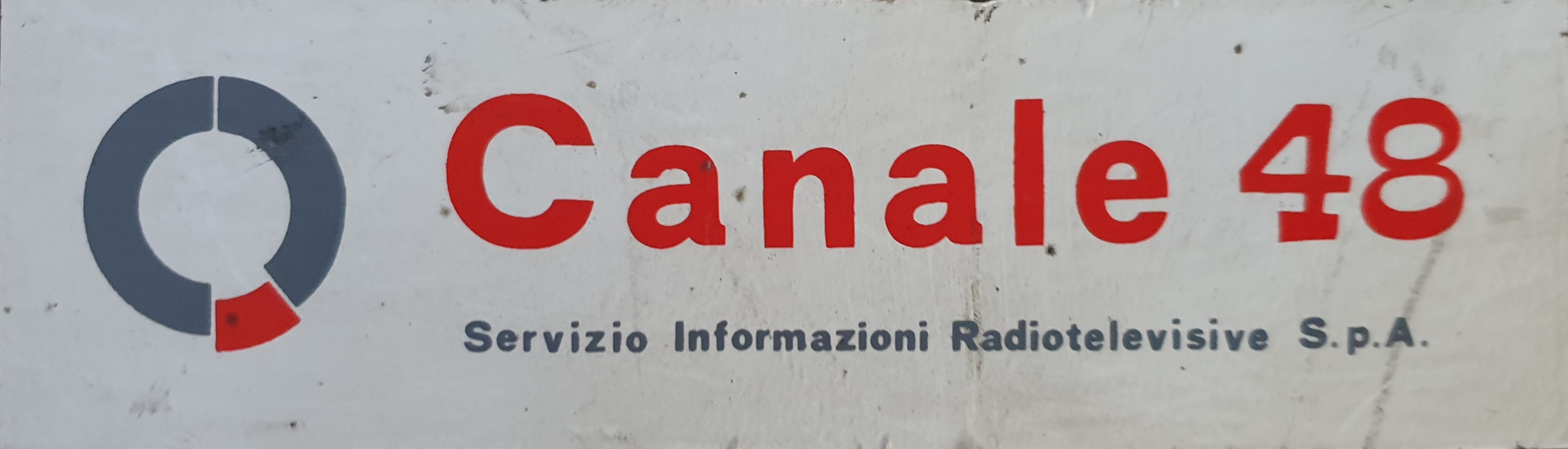 adesivo di canale 48 durante la gestione centro leasing firenze